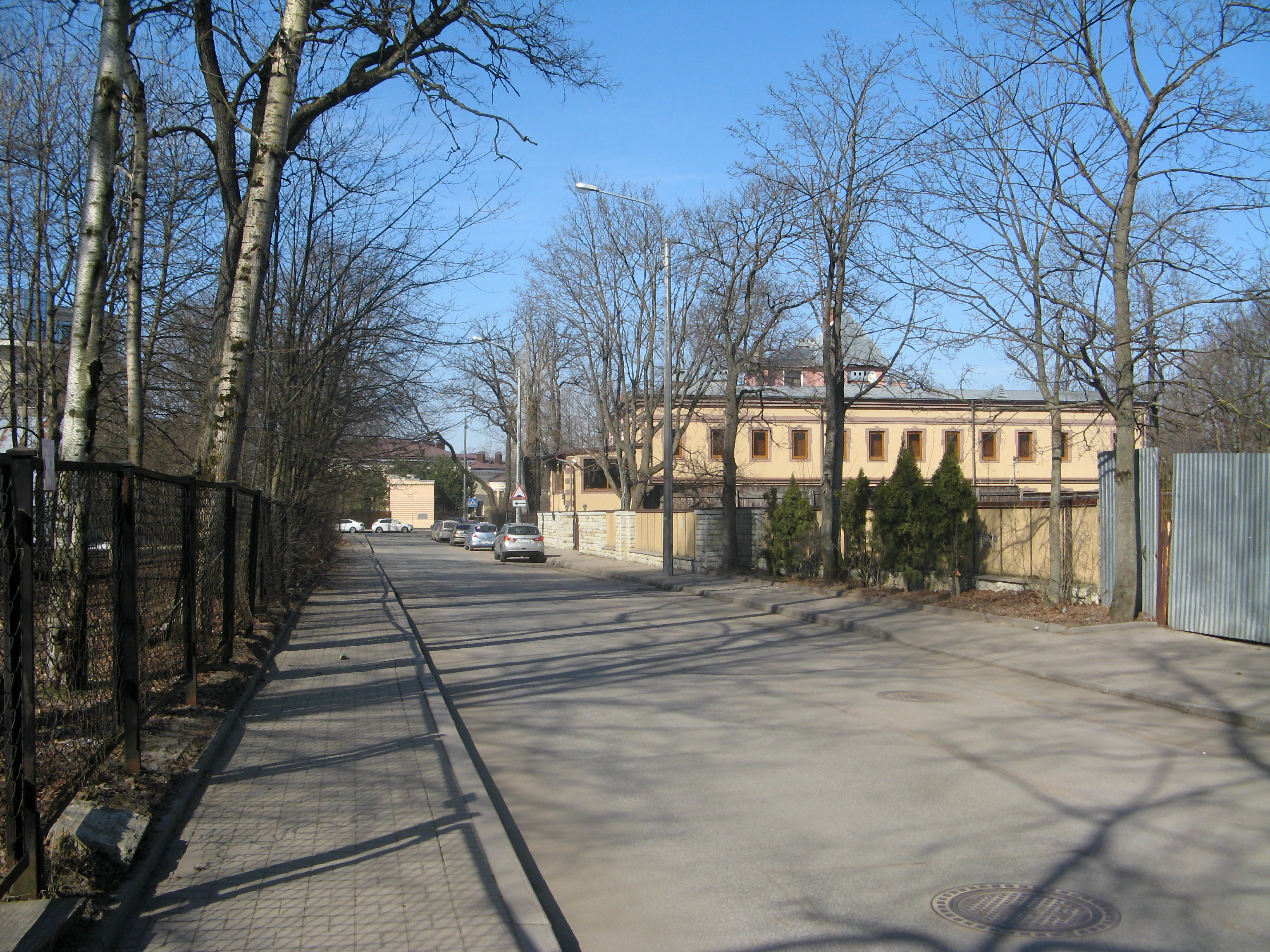 Ольгина улица на Крестовском острове, Санкт-Петербург